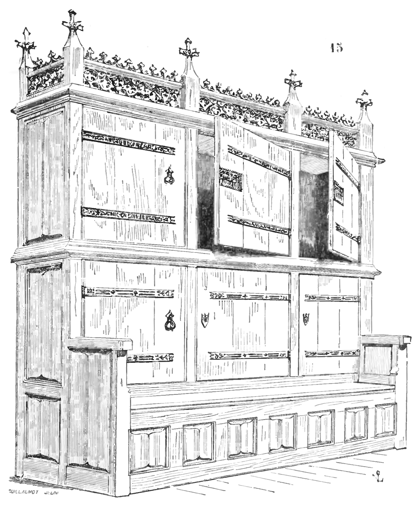 Illustration de l'article « ARMOIRE » du Dictionnaire raisonné du mobilier français.